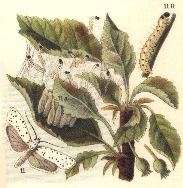 Apple Ermine Moth (Yponomeuta malinellus)